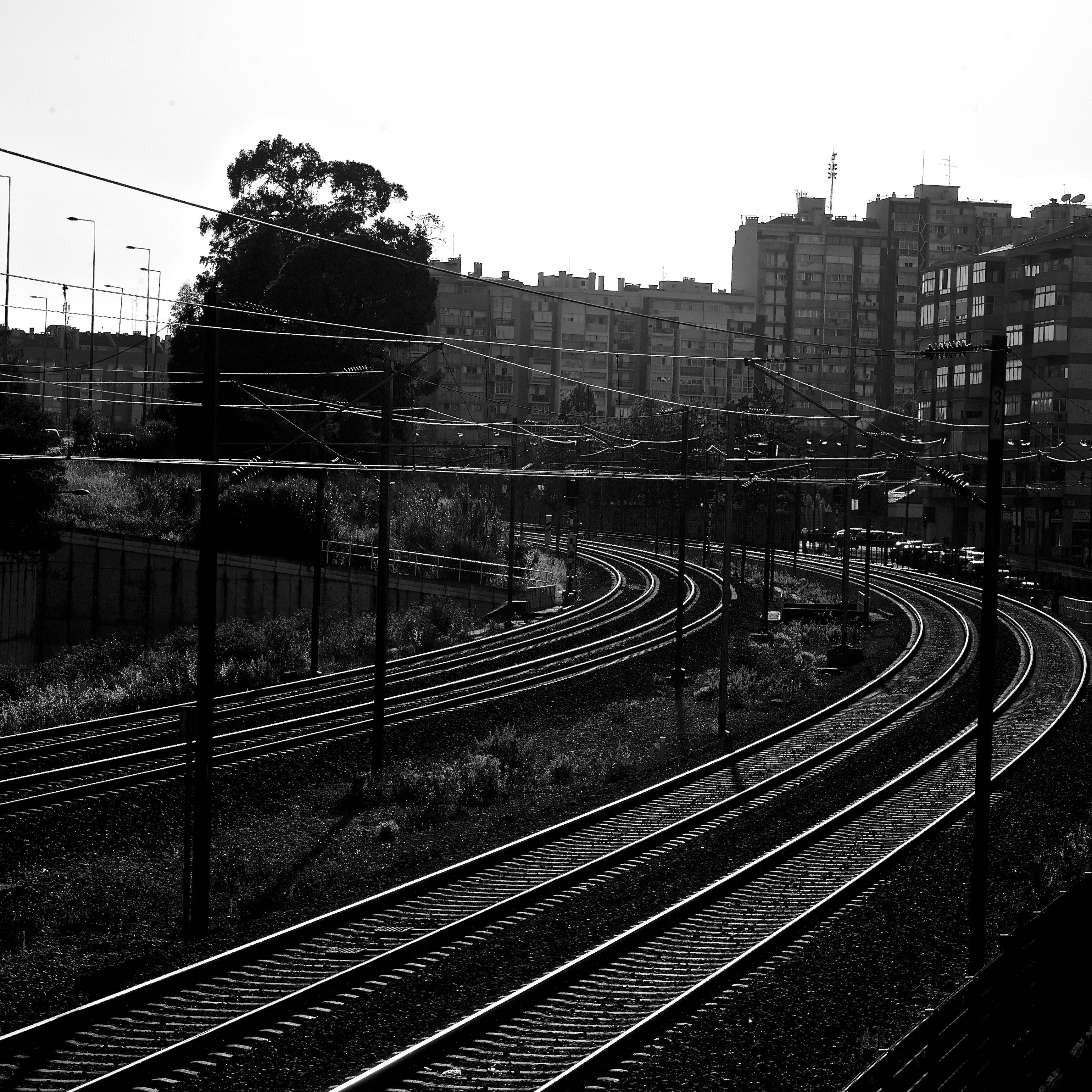 Radial de Benfica, Lisbon, Portugal